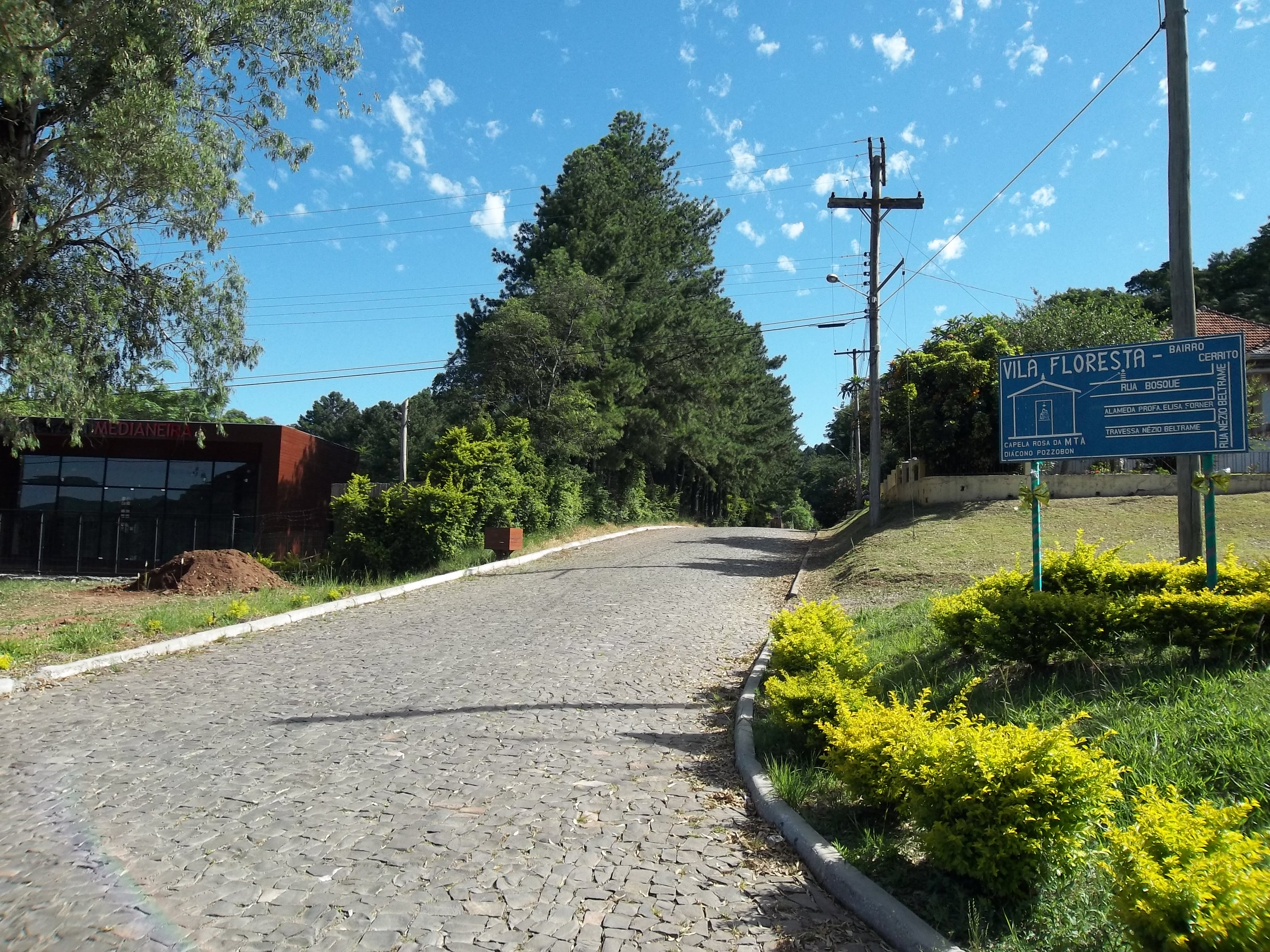 Vila Floresta. Bairro Cerrito. Distrito da Sede. Município de Santa Maria. Estado do Rio Grande do Sul. Brasil.